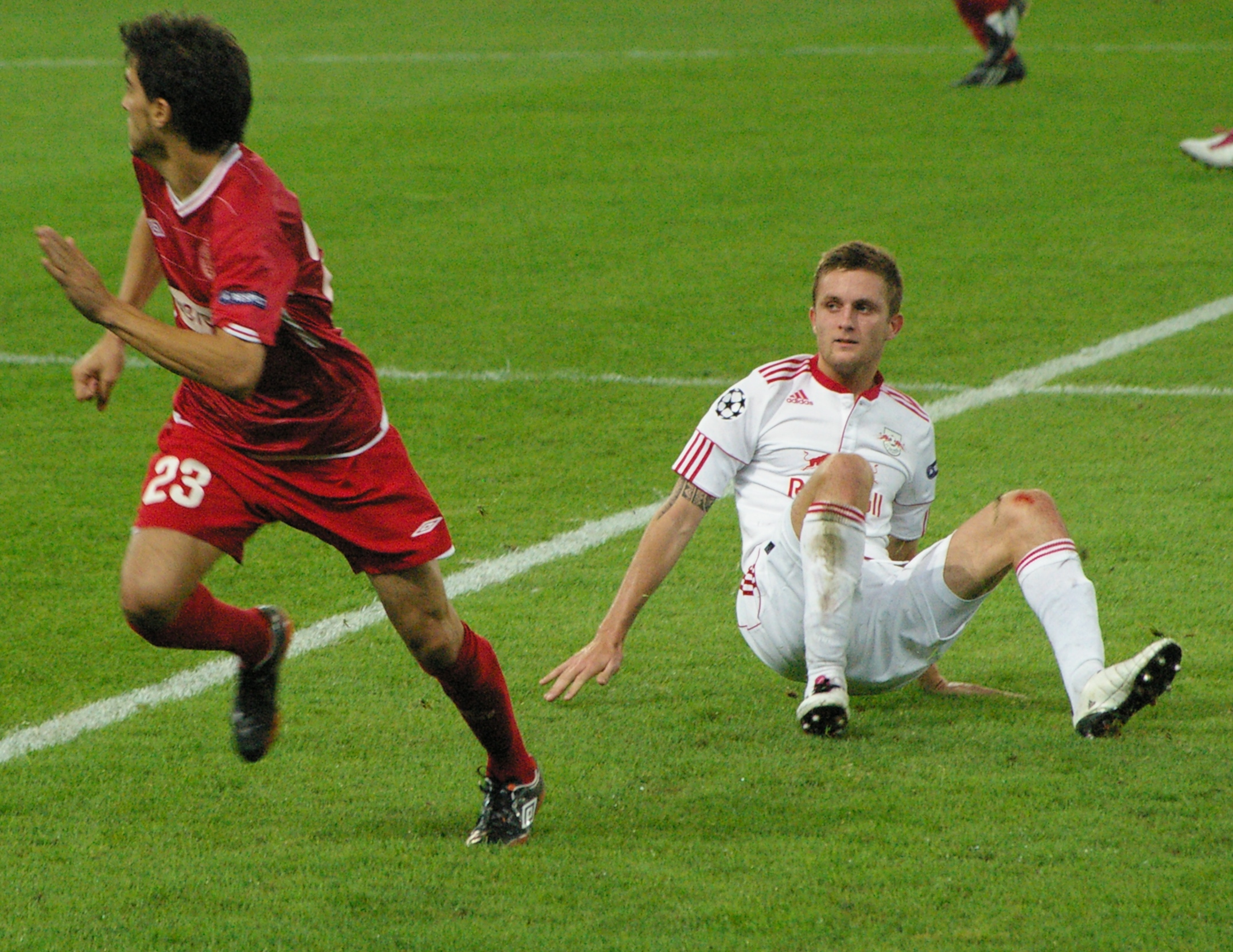 FC Salzburg midfielder Jakob Jantscher and Hapoel Tel Aviv Defender Omri Kende